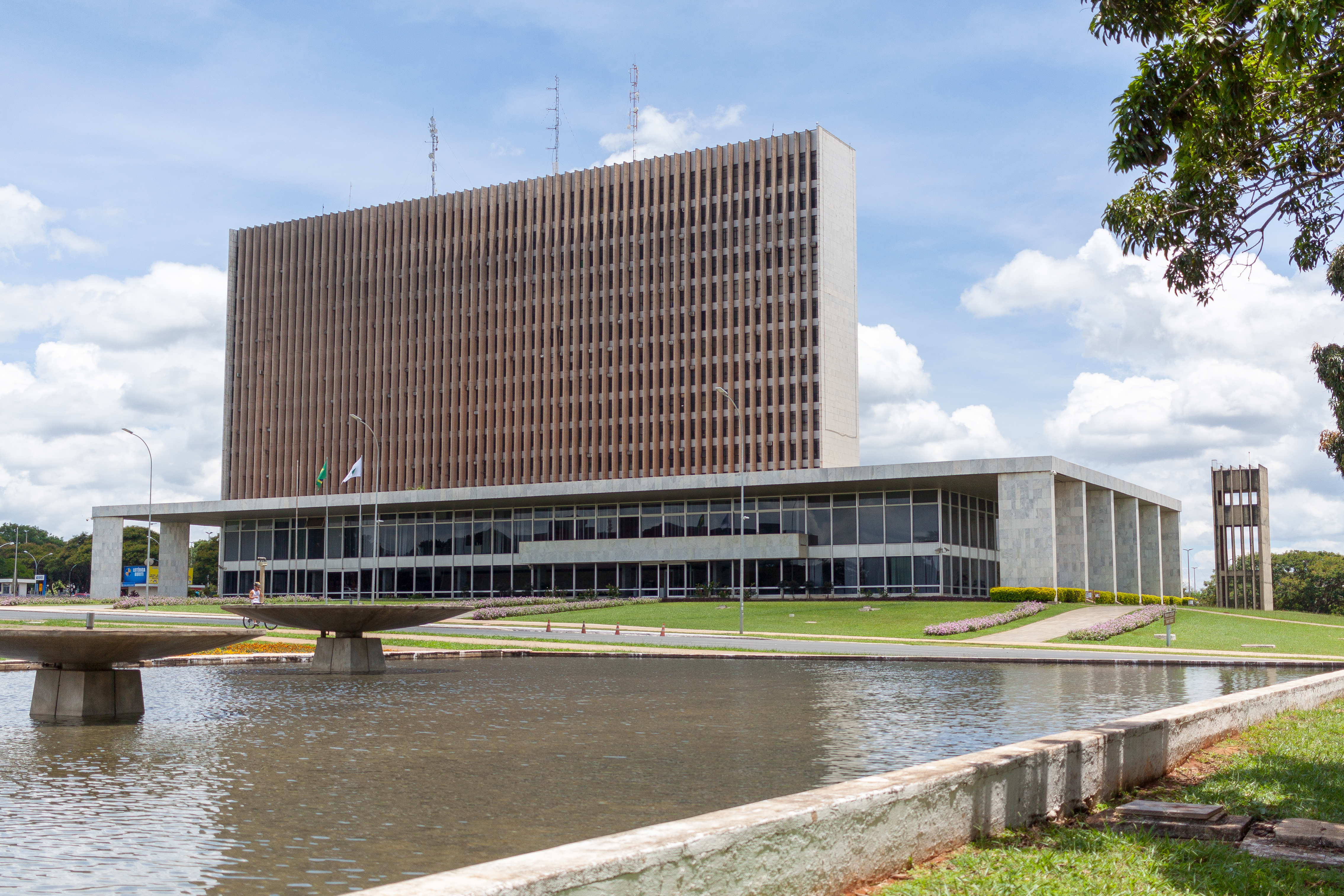 Palácio do Buriti